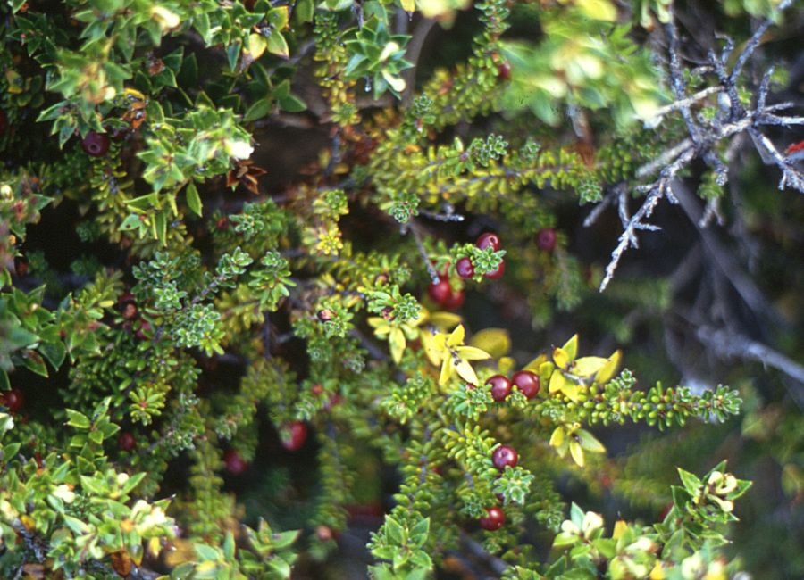 Empetrum rubrum (Ericaceae) - Chile, Patagonien/Patagonia, Parque Nacional Torres del Paine, N Posada Río Serrano